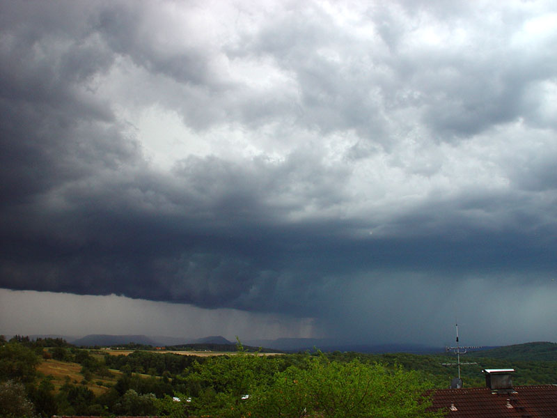 Starkregen